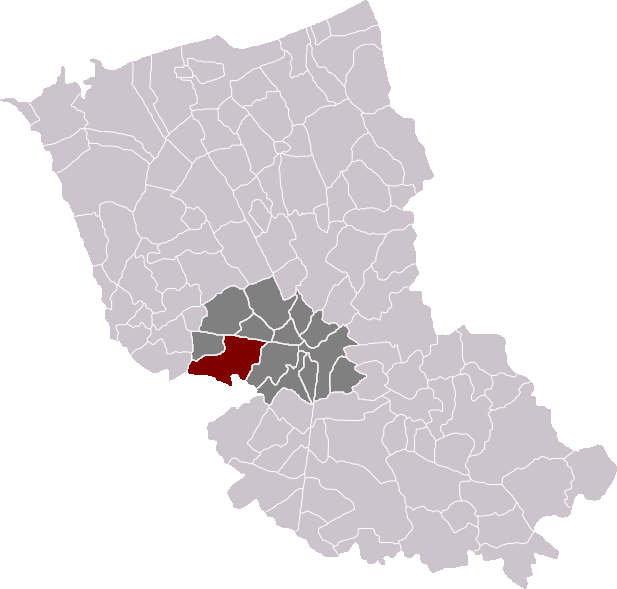 Locatie gemeente Noordpene in arrondissement Duinkerke. Zelfgemaakt. Location of Noordpeene municipality in the arrondissement of Dunkirk. Self made. Localisation de la commune de Noordpeene dans l'arrondissement de Dunkerque. Fait moi-même.